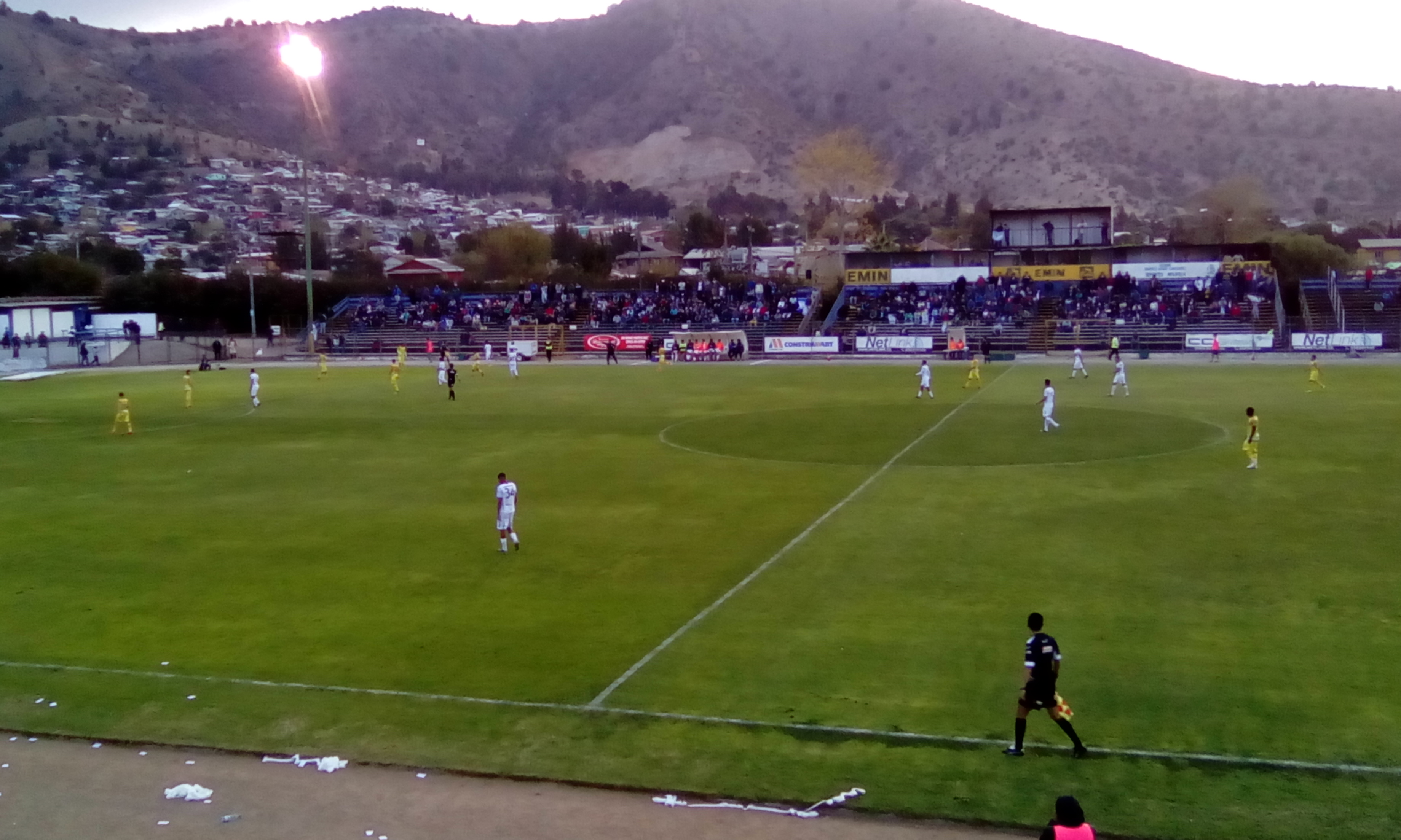 Antiguo estadio Roberto Bravo Santibáñez de Melipilla.